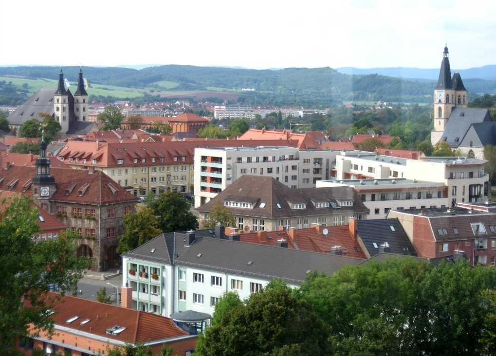 Nordhausen am Harz, Blick vom Petriturm über das Zentrum mit Dom und Blasiikirche.